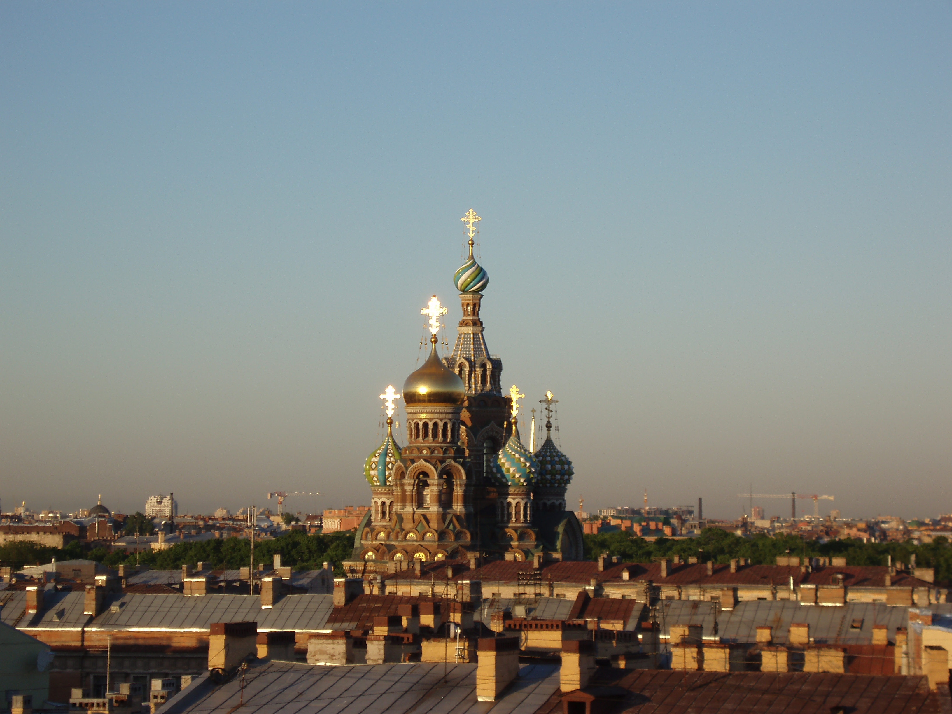 собор Воскресения Христова («Спас на крови»)